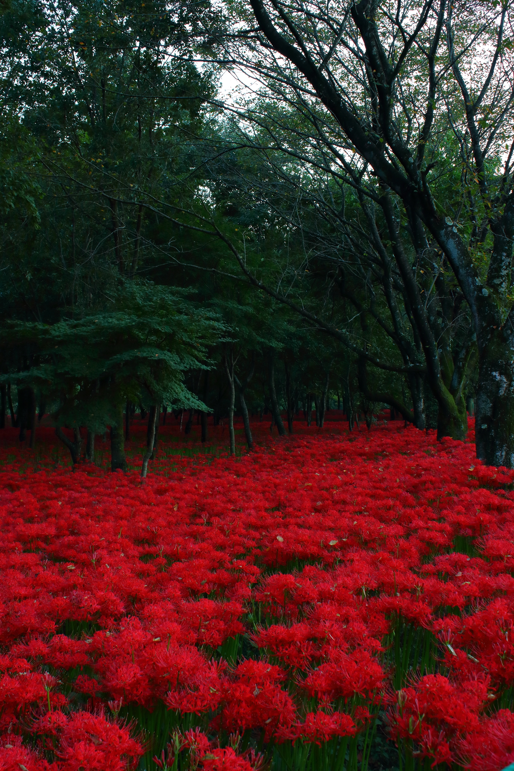 彼岸花（曼珠沙華）- 埼玉県日高市「巾着田」